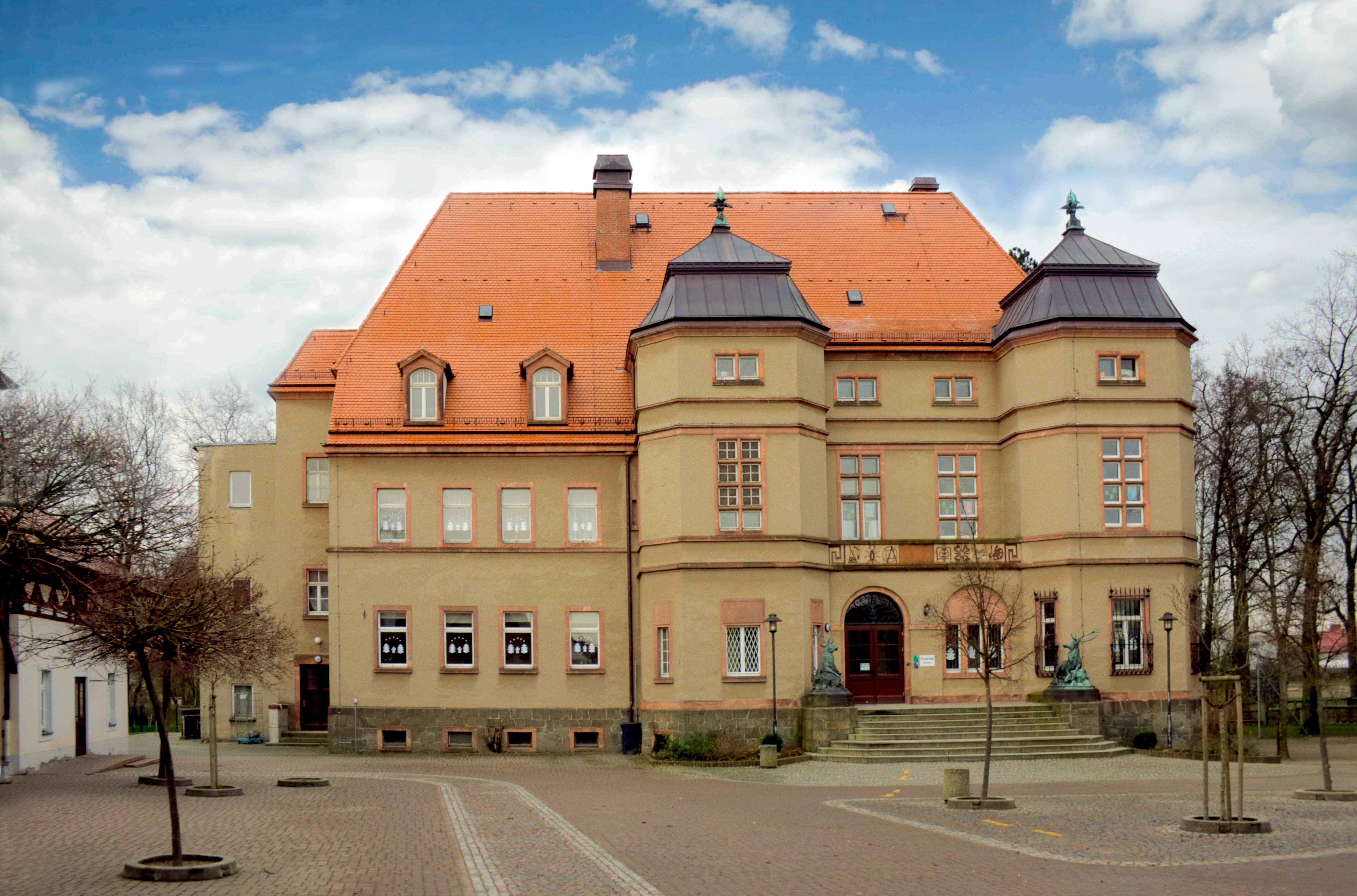 Schloss Cavertitz, Schulhof 1 in Catertitz